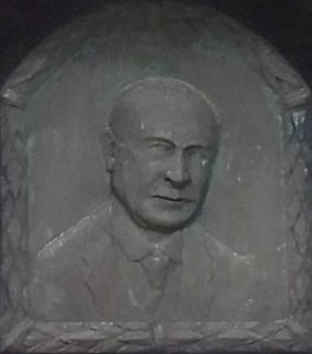 Rudolf C. Kripner (1858-1924)